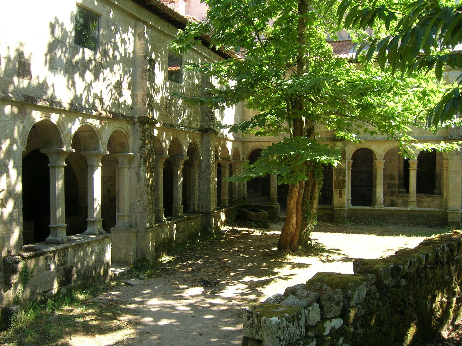 Vista exterior do Claustro. Mosteiro de Santa Cristina de Ribas de Sil, Parada de Sil, Galiza